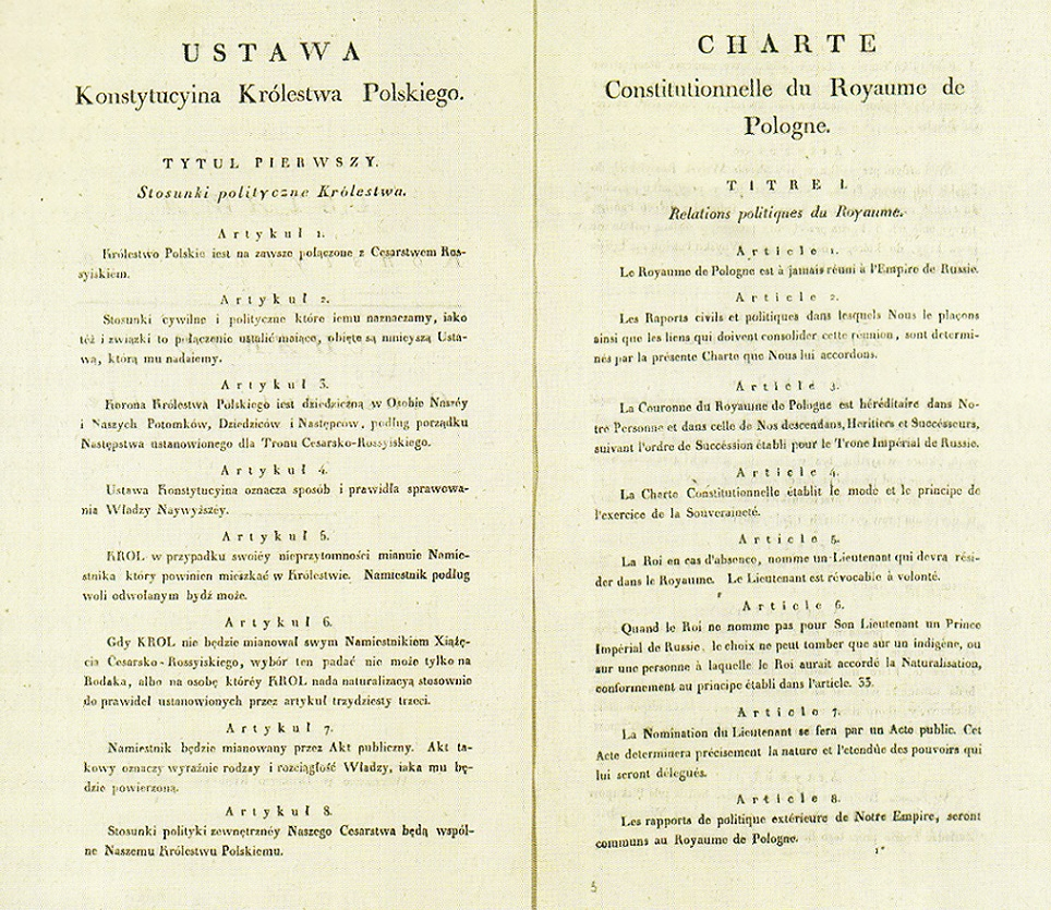 Ustawa Konstytucyjna Królestwa Polskiego